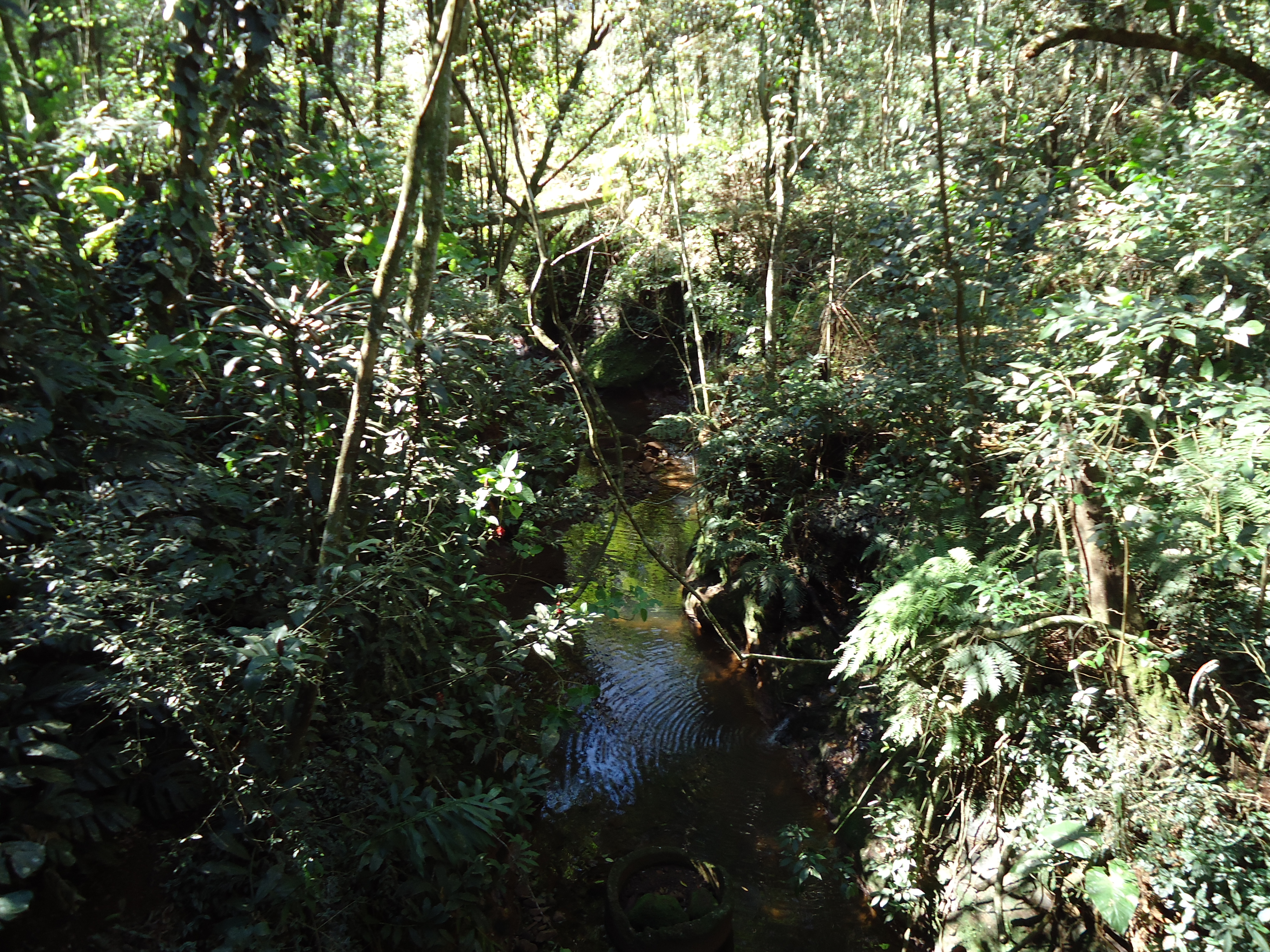 Imagens de julho de 2013